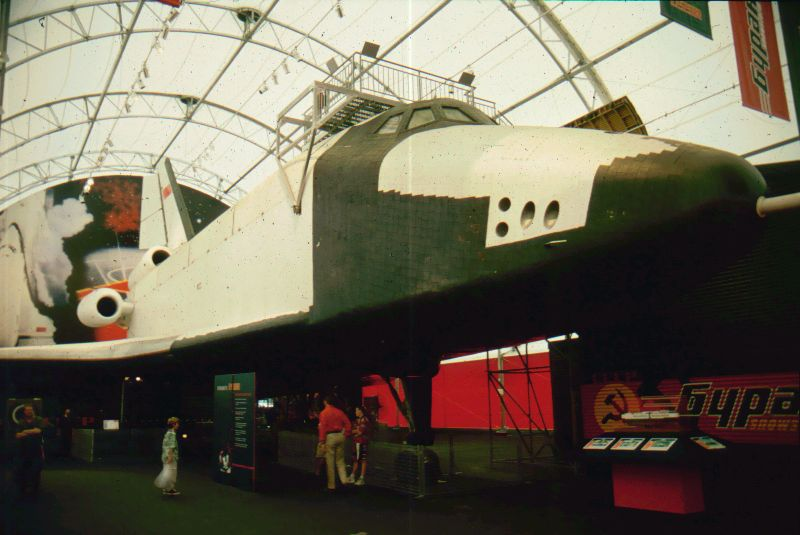 Russische Raumfähre Buran (OK-GLI), Ausgestellt in Sydney, Australien